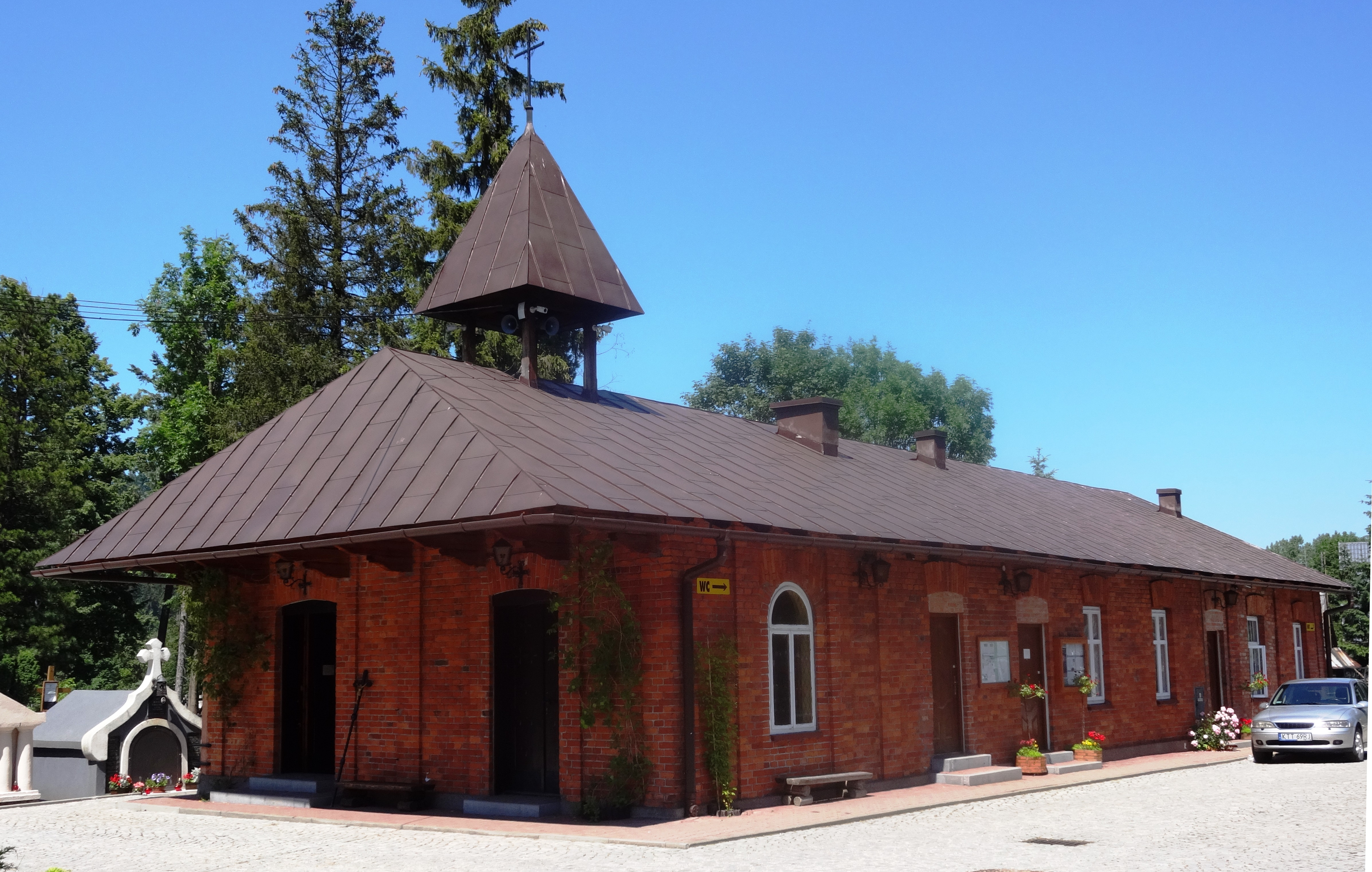 New Cemetery in Zakopane